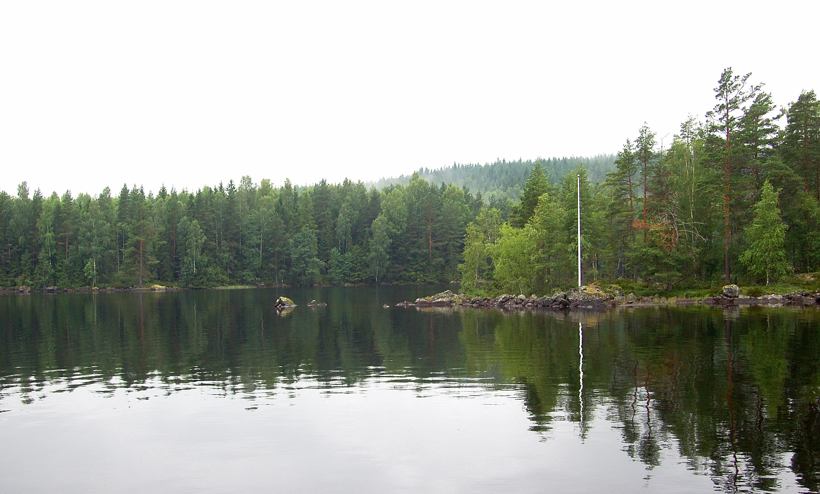 Övre Gla i Arvika kommun. Flaggstången används för att markera eldningsförbud inom reservatet.